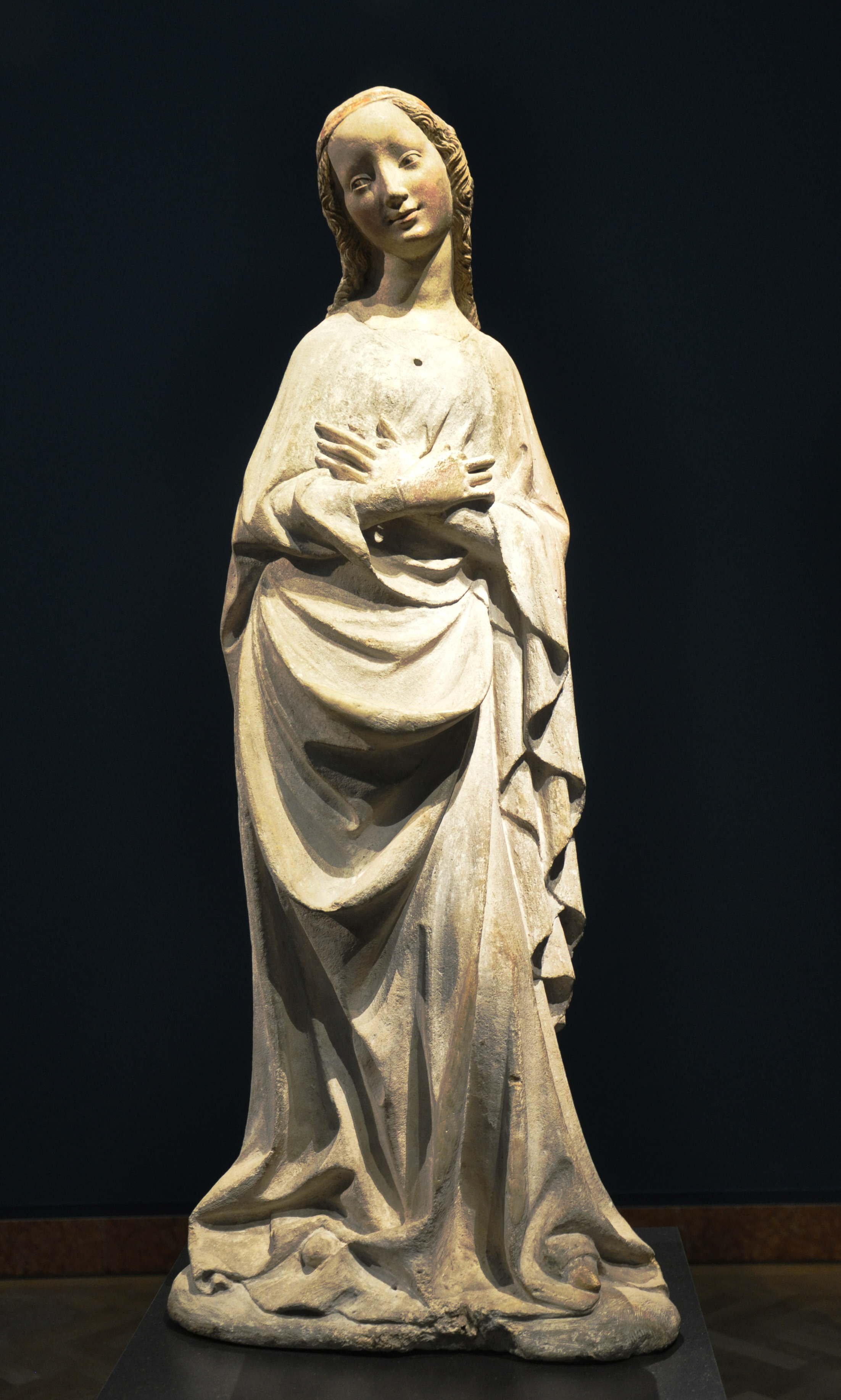 Meister von Großlobming: Maria aus einer Verkündigungsgruppe, Wien um 1400; Breitenbrunner Kalksandstein, Reste originaler Farbfassung Liebieghaus, Frankfurt am Main, Inv. Nr. St.P. 394; Weblink